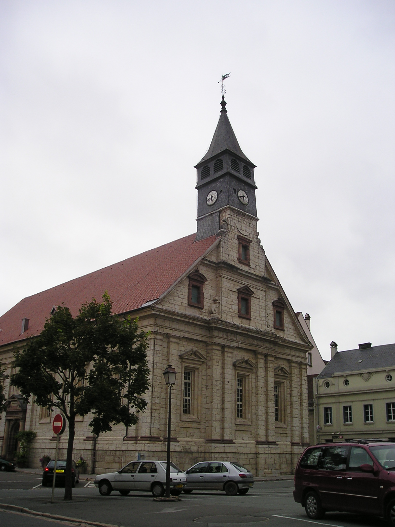 Montbéliard,_Temple_Saint-Martin